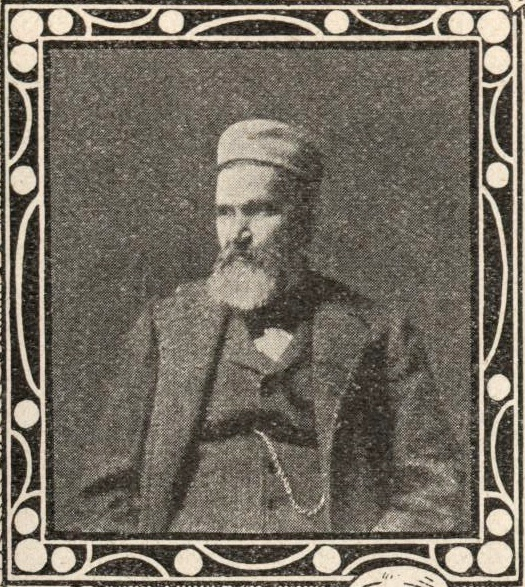 Albrecht von Felsburg, Nazarenermaler (1838-1905)